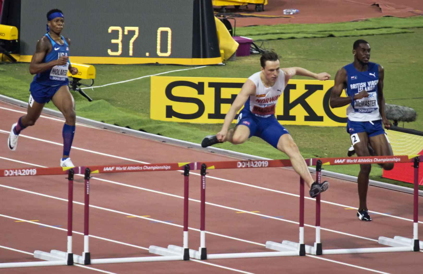 DOH40273 400mH final men